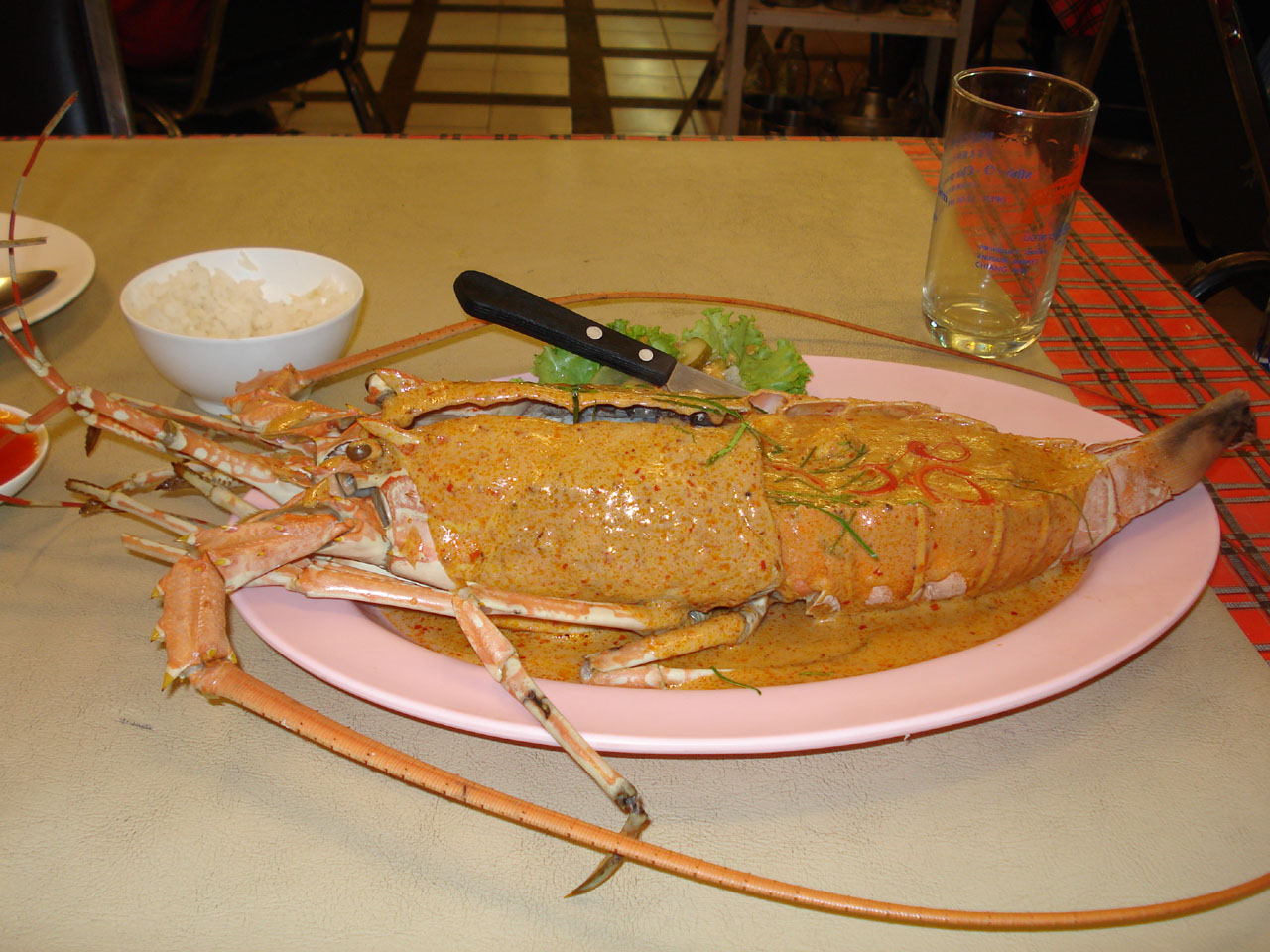 Langusta w sosie curry.